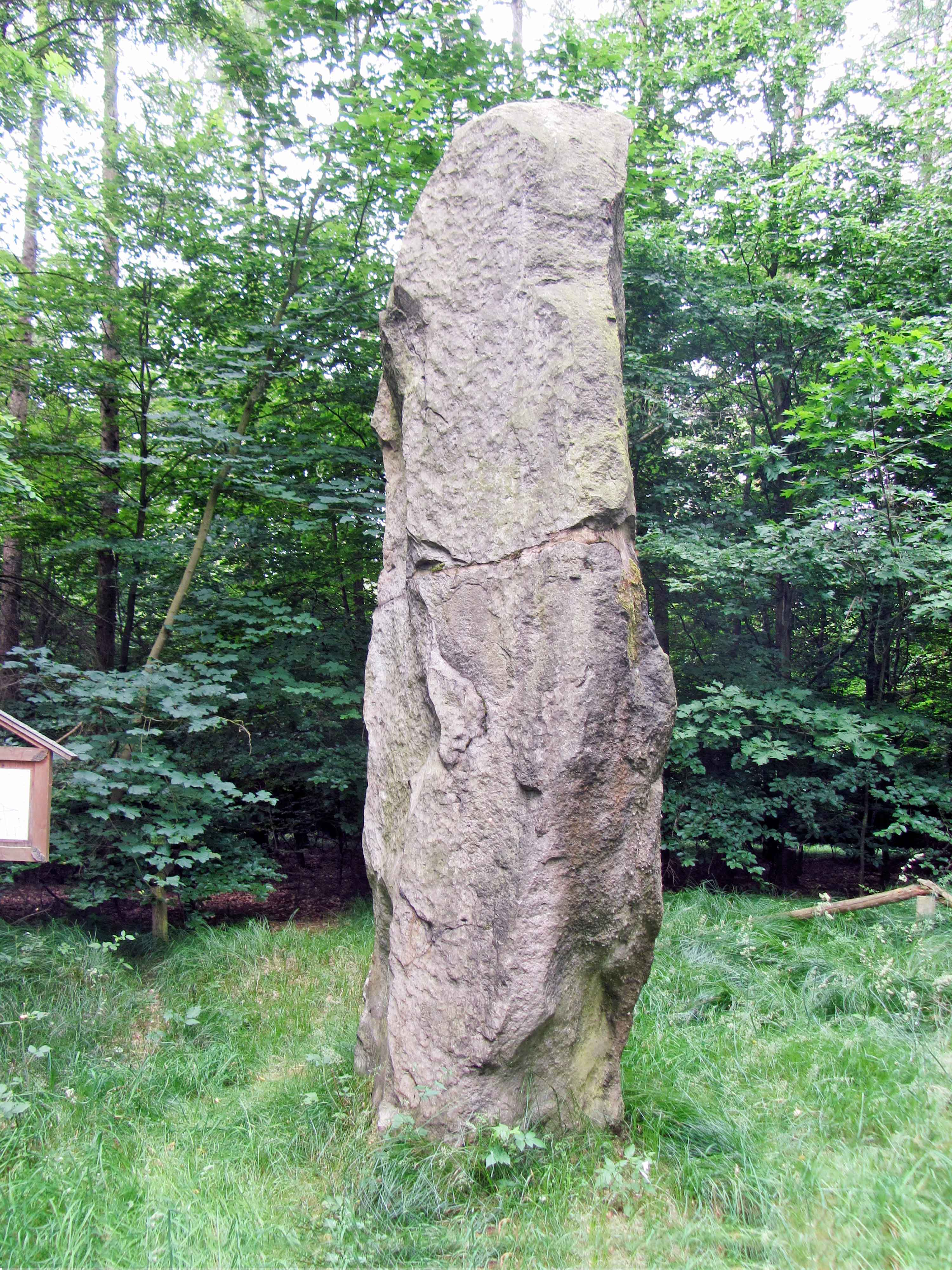 Monolith im Thümmlitzwald